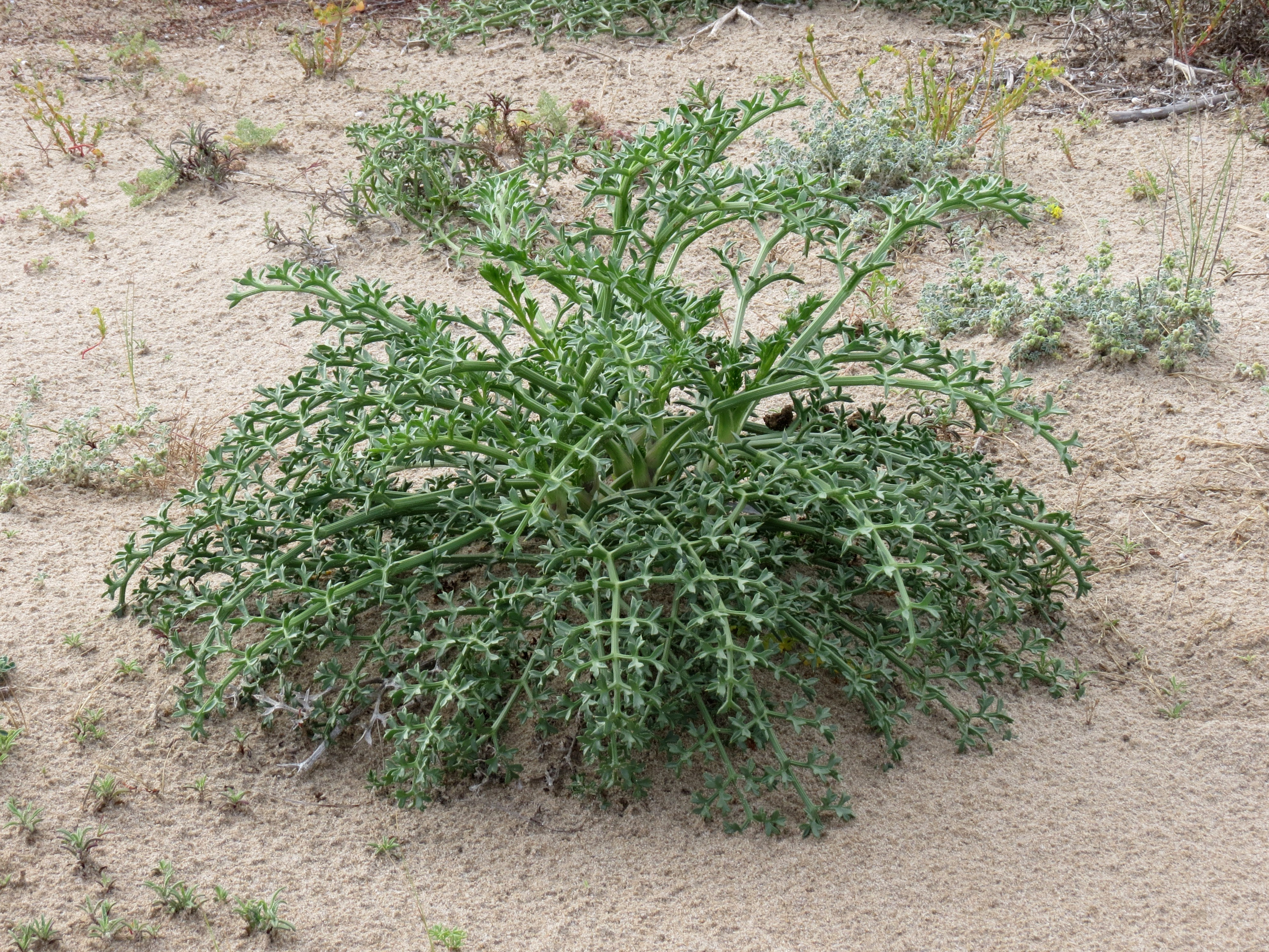 Echinophora spinosa L., 1753, Roda de Barà, Spain, 20 May 2013